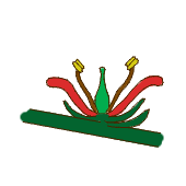 Morfología de la flor. Flor perfecta (bisexual) y sésil. Según Simpson (2005) Plant Systematics.